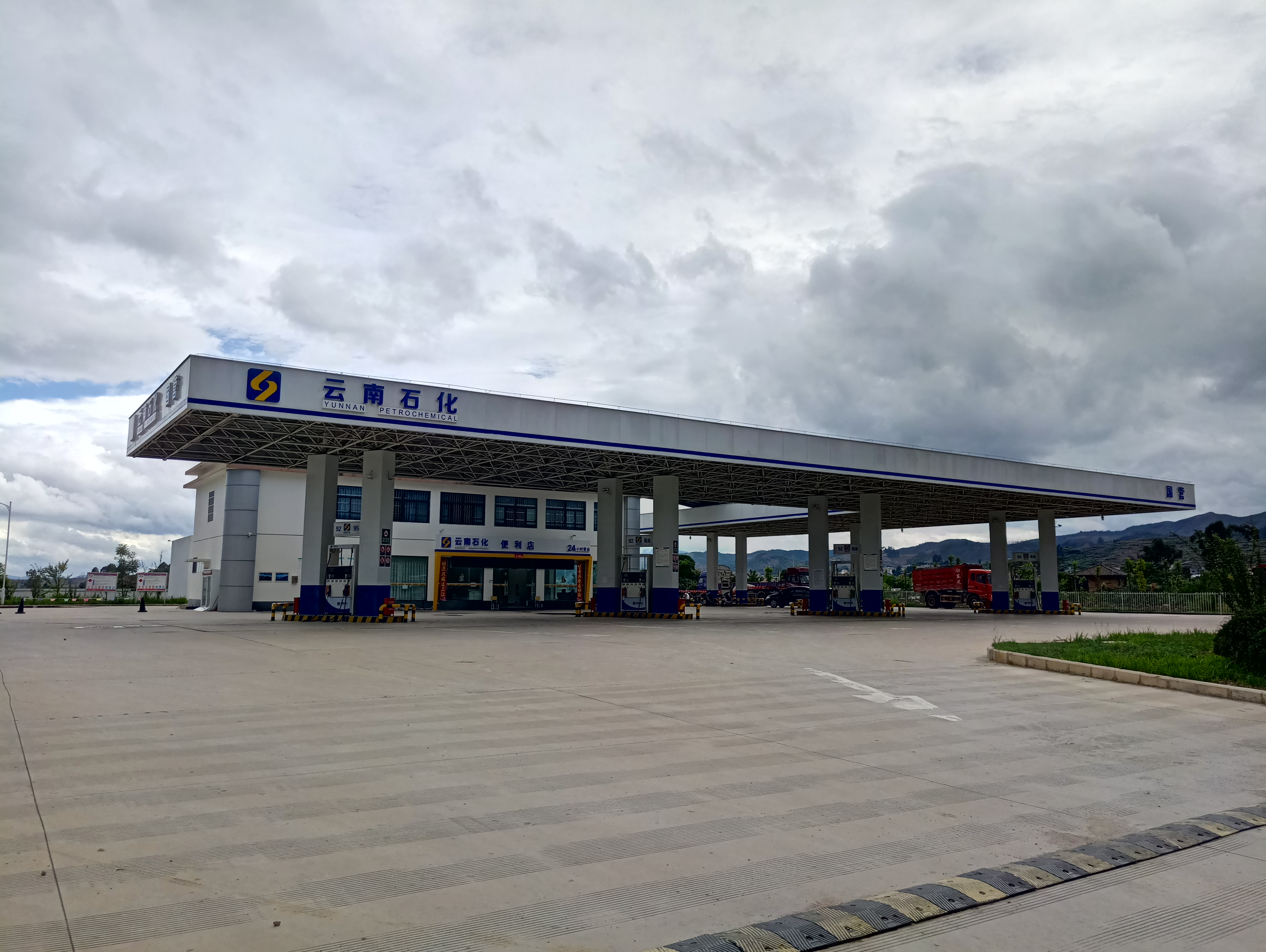 中文（中国大陆）: 石林县狮山路云南石化加油站